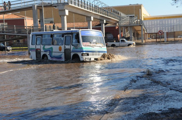 Pasarela ubicada al Supermercado Lider en La Serena, Chile. 6 de junio de 2011